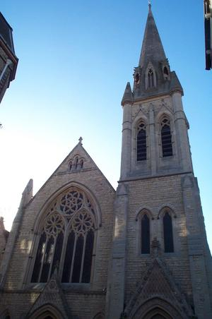 לקוח מוויקיפדיה באנגלית